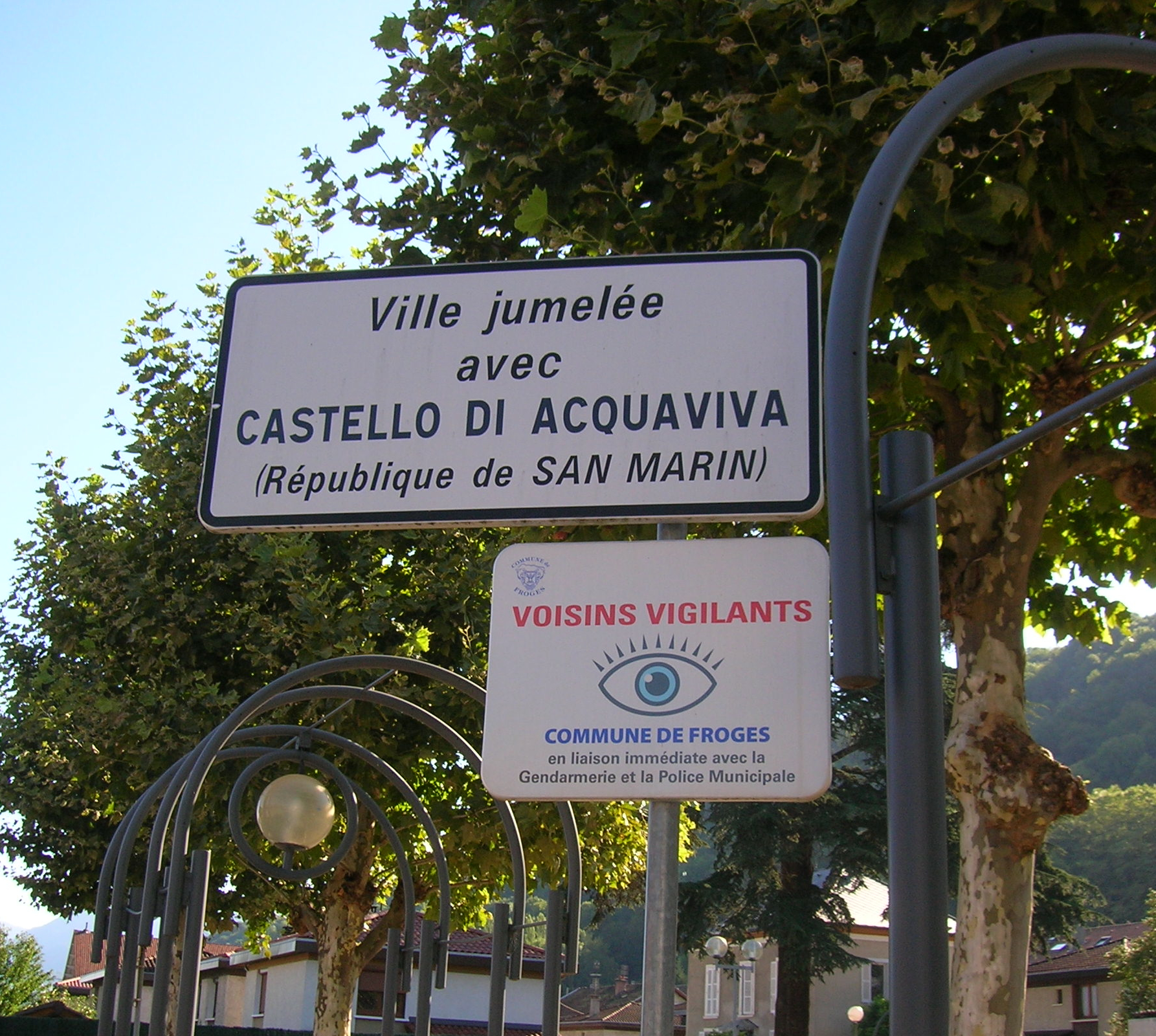 panneaux jumelage, Brignoud, Villard-Bonnot, Isère, AuRA, France.